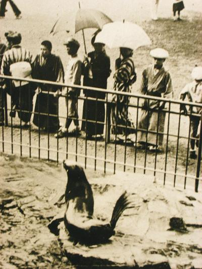 昭和3年(1928年)のオットセイ池。上野動物園。開園125周年パネル展。